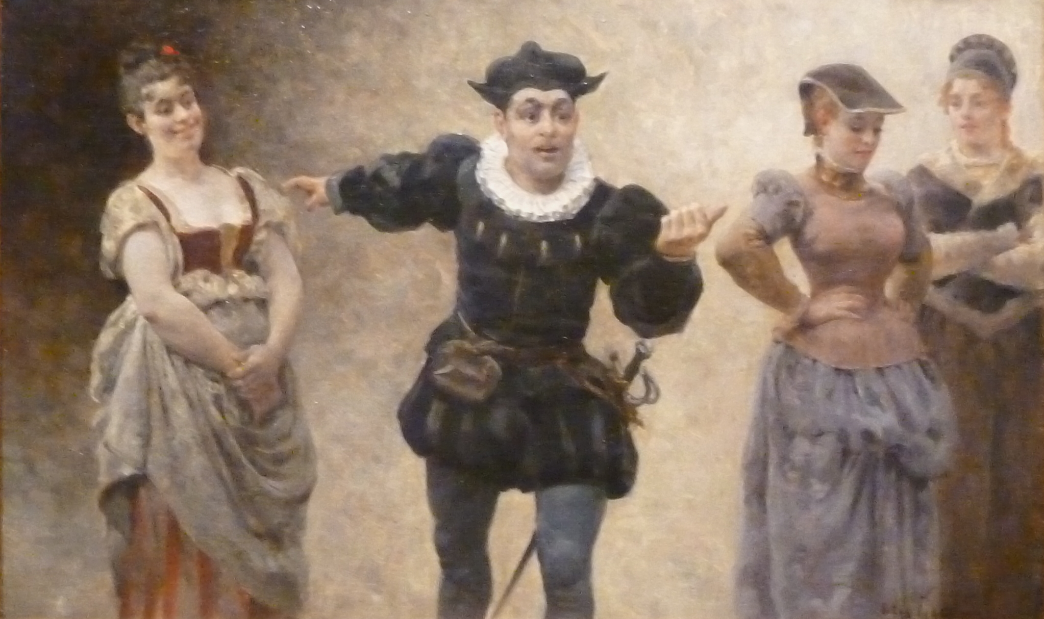 Tableau inspiré par Pantagruel, chapitre 17 (huile sur toile, vers 1870). Musée de Rabelais, dépôt de la Devinière et de l'Association des Amis de Rabelais. (Jules-Arsène Garnier)